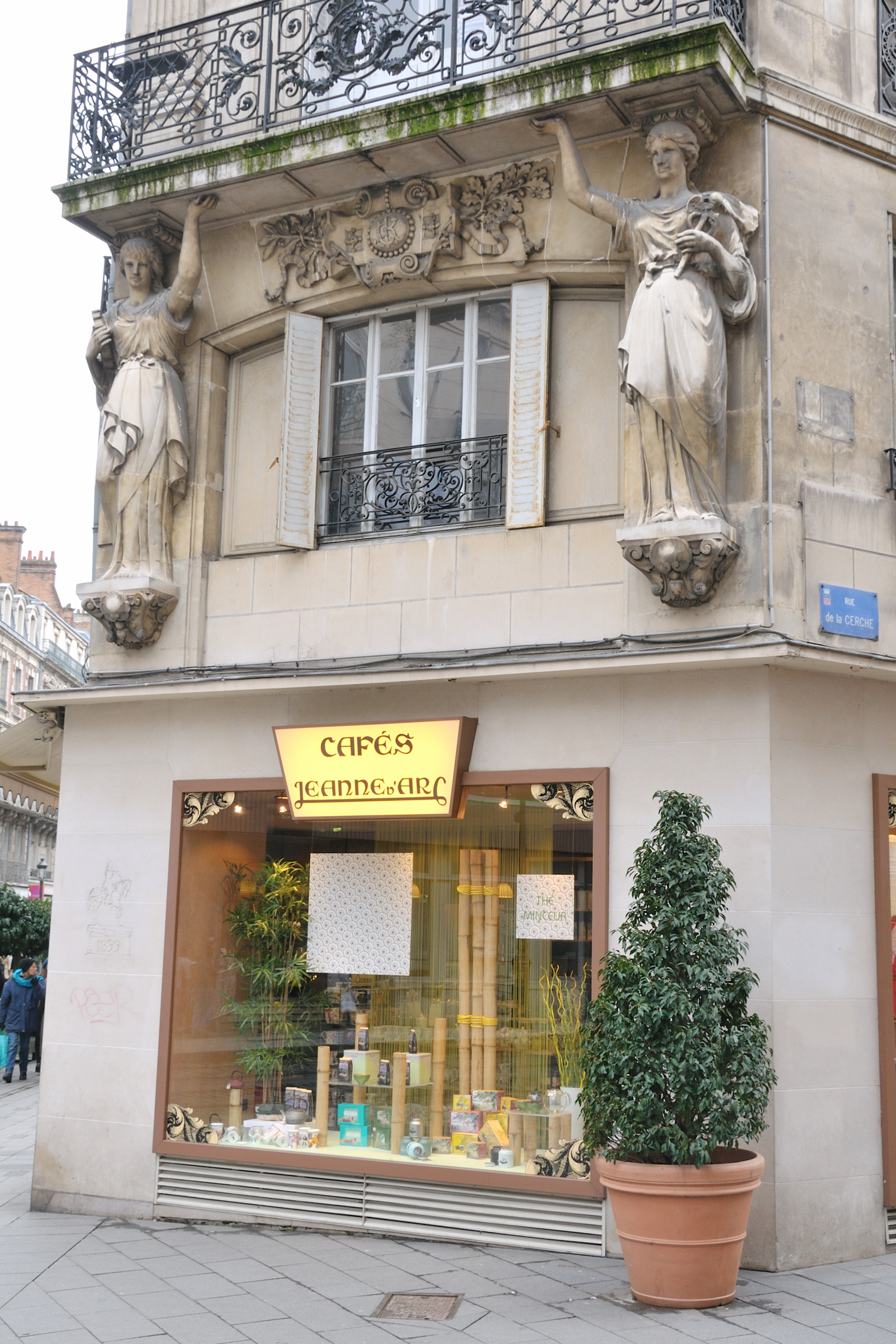 Boutique des Cafés Jeanne-d'Arc située au 7, rue de la République, Orléans, Loiret, France